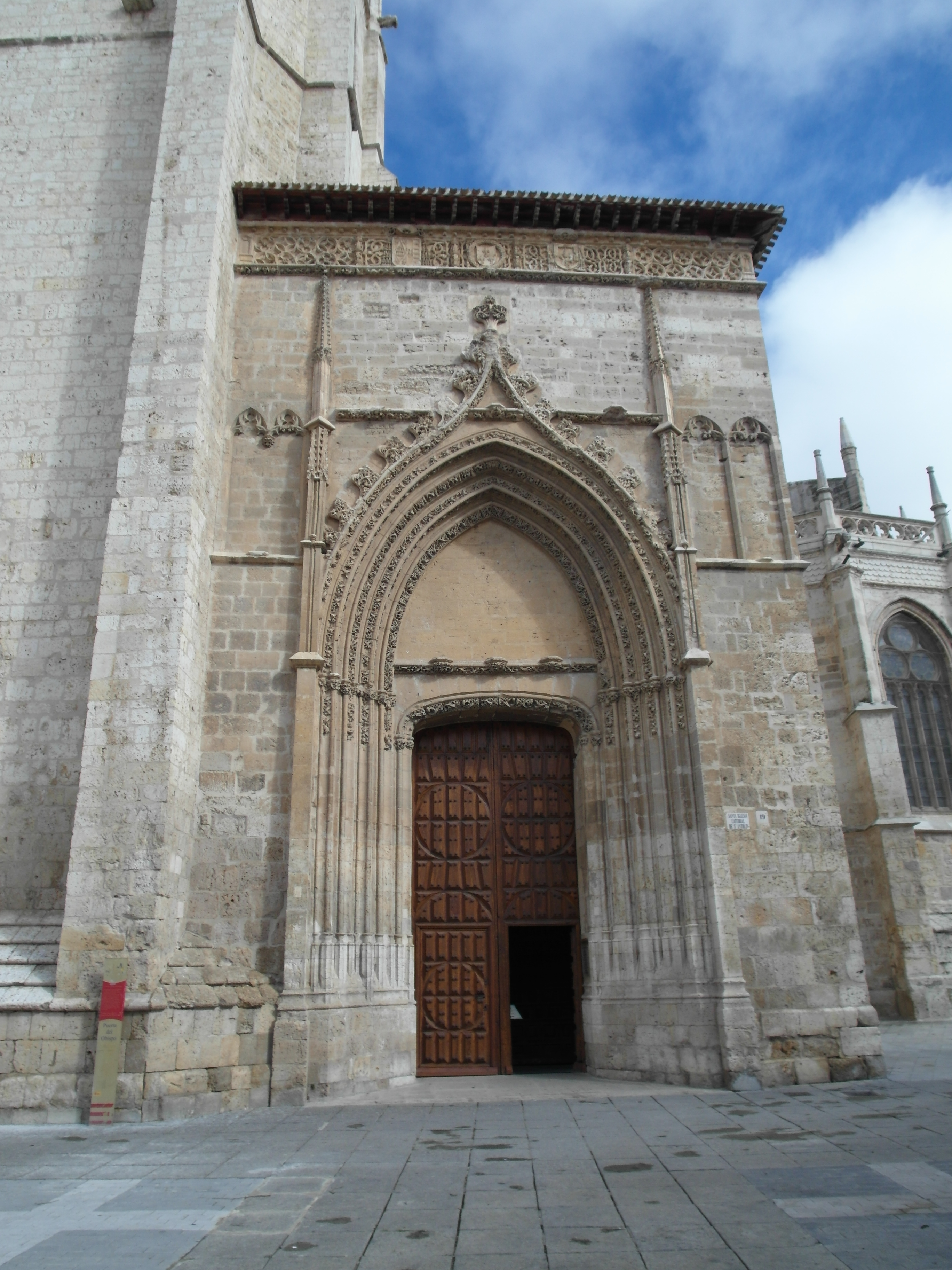 Catedral de Palencia, Palencia.